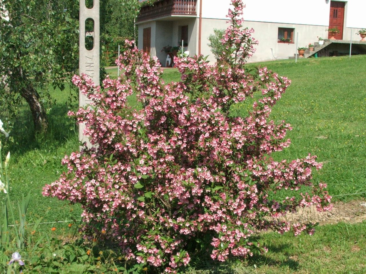 Weigela florida (pl. krzewuszka cudowna)